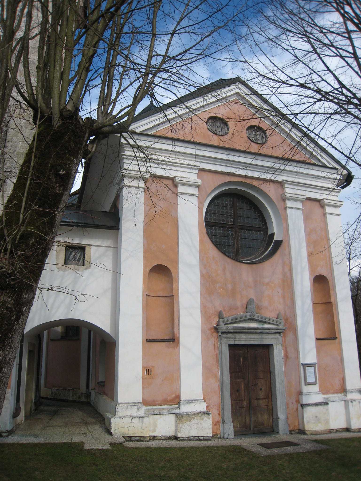 Cerkev sv. Andreja, Sveti Andrej: pogled na zahodno fasado in mostovž proti zvoniku